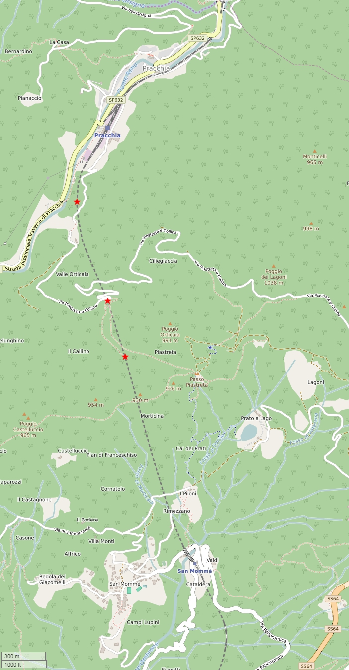 Ubicazione geografica della Galleria dell'Appennino e posizione dei 3 pozzi oggi visibili